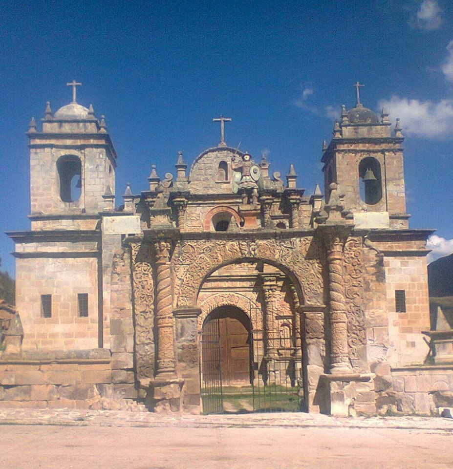 construido de puramente piedra sillar